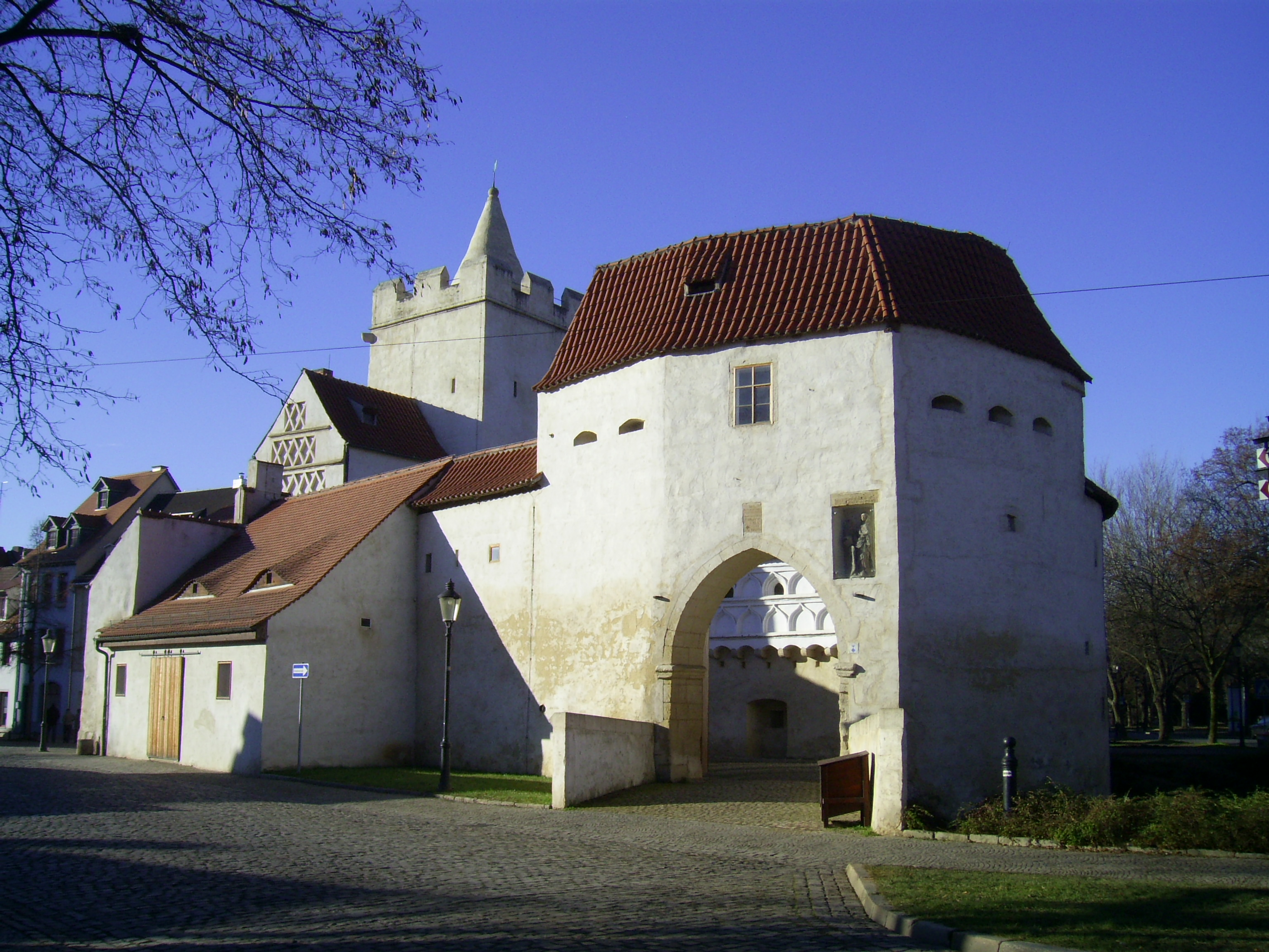 Torbrücke und Außentor des Marientors in Naumburg (Saale)